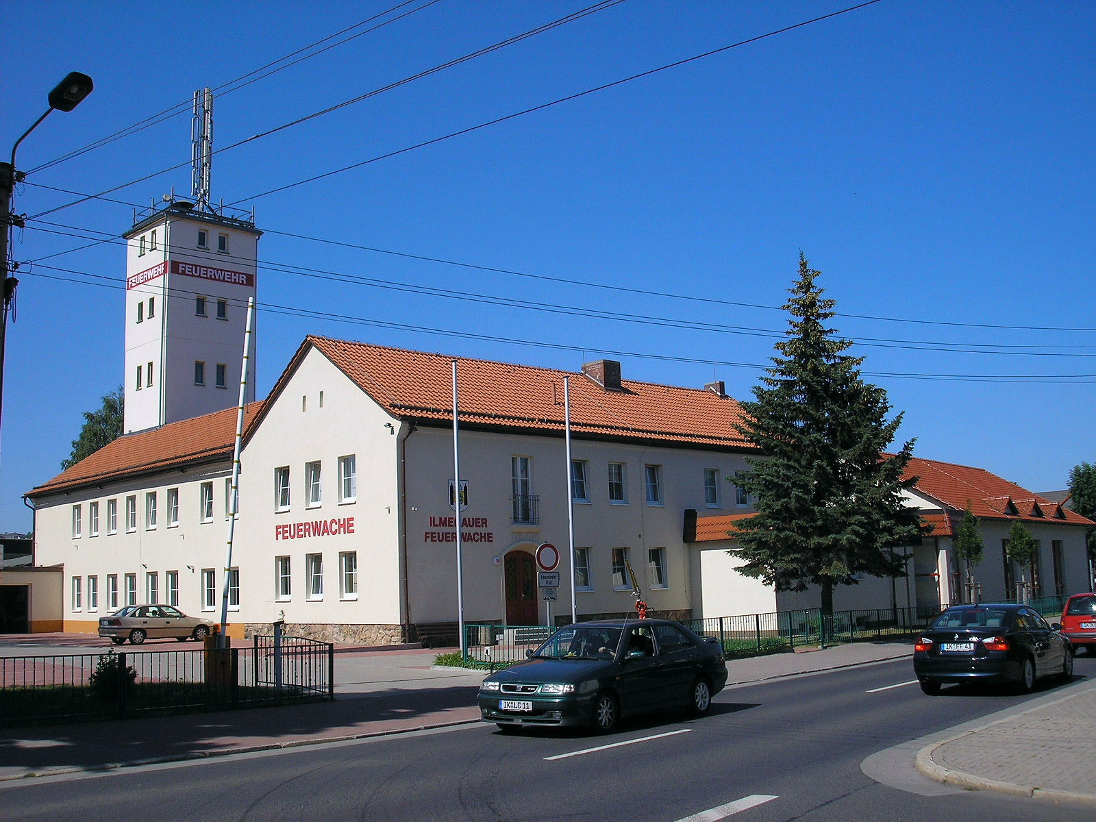 Die Feuerwache von Ilmenau (Thüringen).